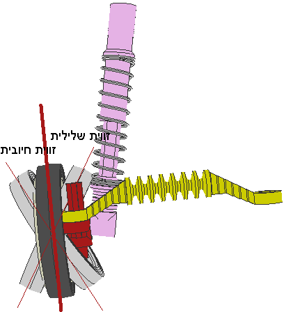 אני יצרתי את הקובץ באמצעות LeoCad